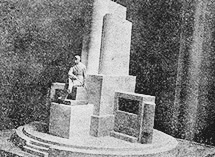 maqueta del monumento a Enrique Gómez Carrillo, 1940